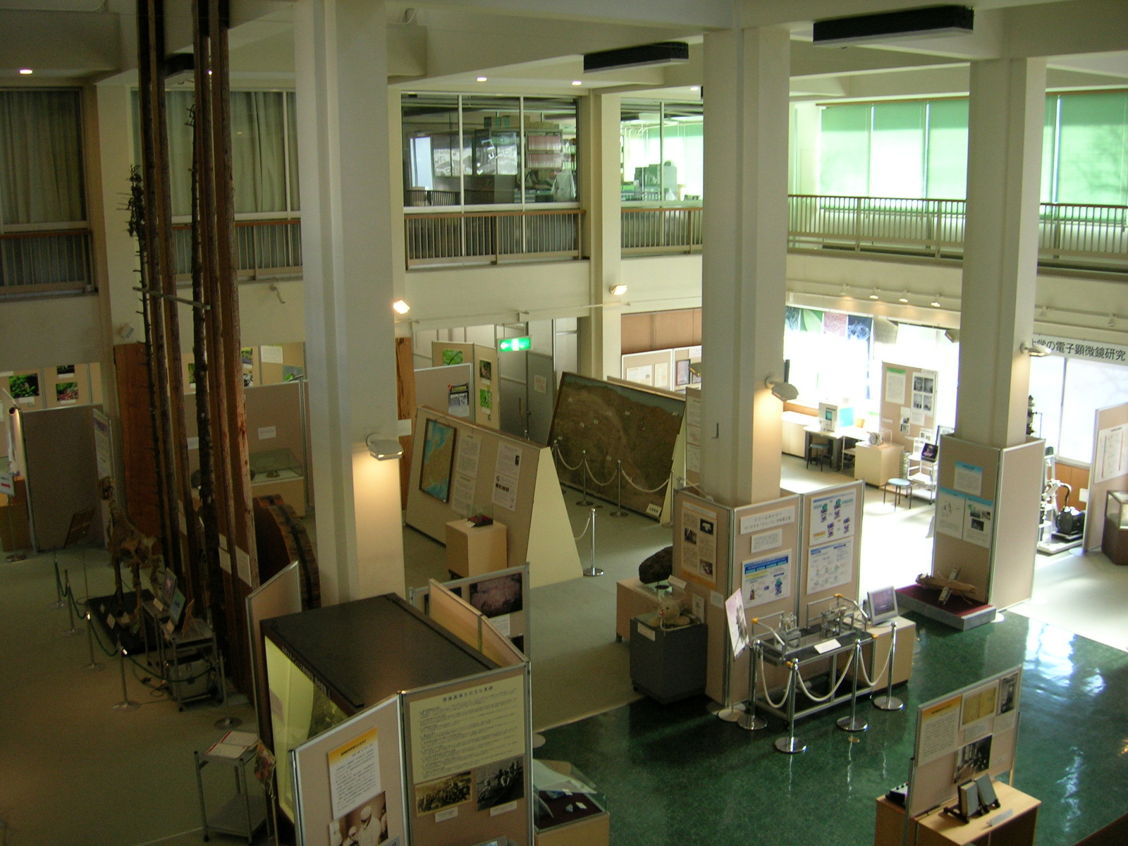 Nagoya Daigaku Hakubutsukan (Nagoya University Museum). Loc: Chikusa-ku, Nagoya city, Aichi Prefecture, Japan. 名古屋大学博物館・館内 撮影場所 愛知県名古屋市千種区